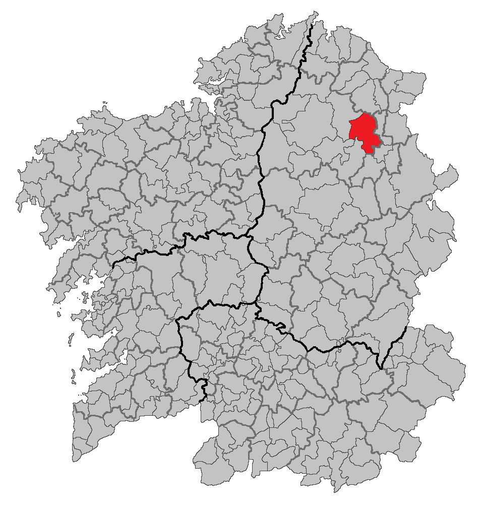 Mapa coa localización do concello de A Pastoriza.